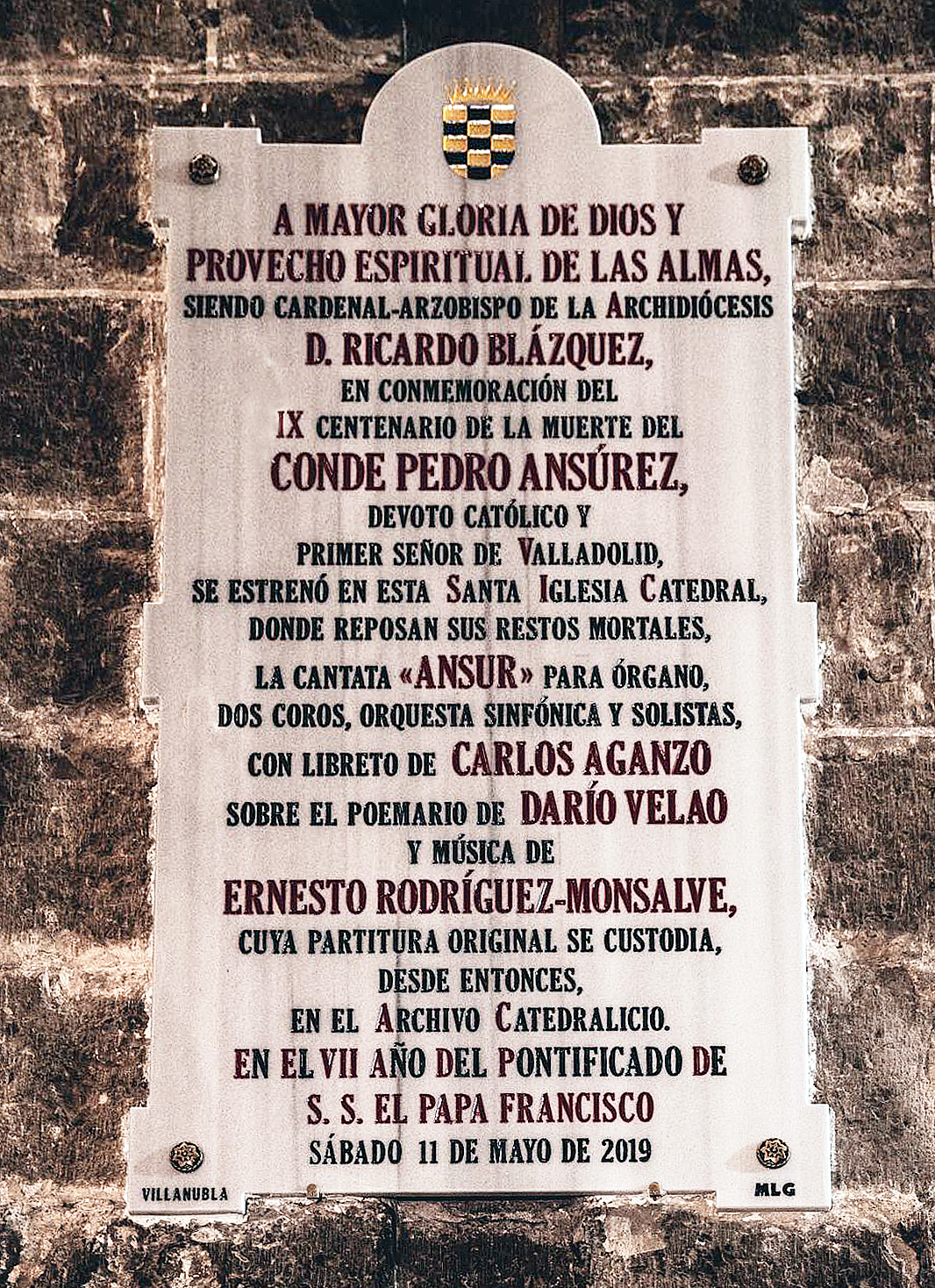 Placa conmemorativa del conde Pedro Ansúrez, fundador de la ciudad de Valladolid, y el estreno de "Ansur" en el IX centenario de su muerte. Instalada en la Catedral de Valladolid, junto al sepulcro del noble.